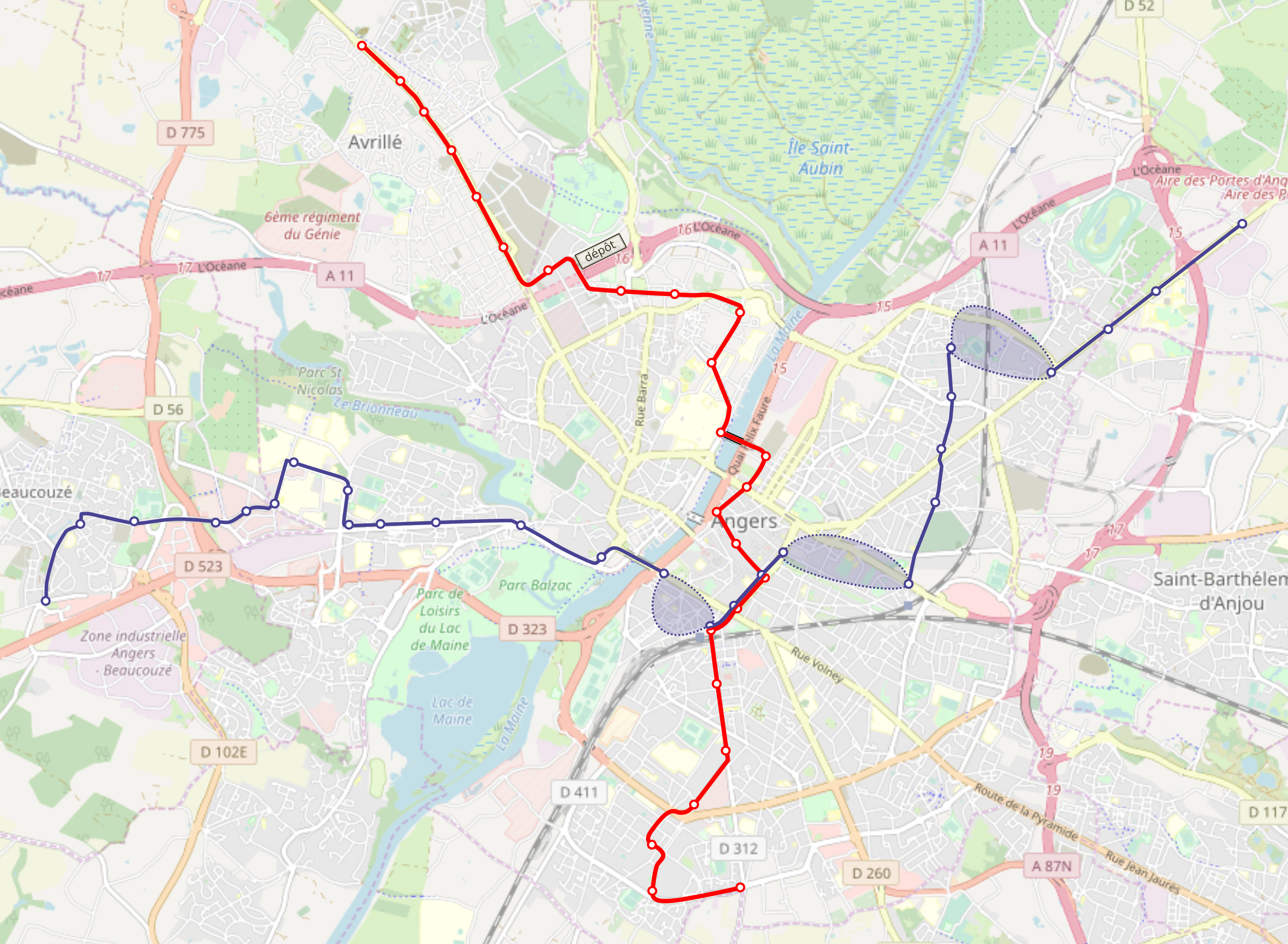 Plan de la ligne B prévue par l'équipe du maire Antonetti et à présent caduc. Source concernant le tracé des lignes. This map may be incomplete, and may contain errors. Don't rely solely on it for navigation.